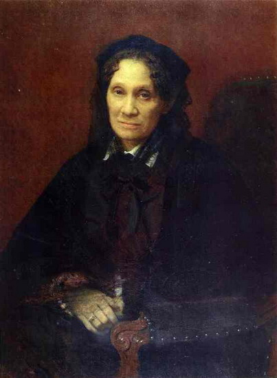 Екатерина Никтополеоновна Корнилова (1820—1897)